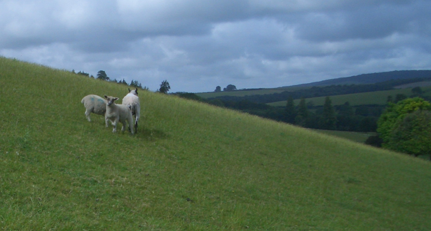 Schafzucht in West Dean, South Downs